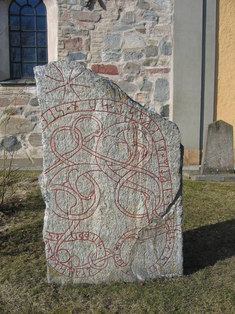 Runstenen U48, Lovö kyrka. U 48 är en av fem runstenar som är uppställda vid Lovö kyrka. Texten lyder: "Illuge lät resa efter Stingfast sin son...fast efter sin broder."